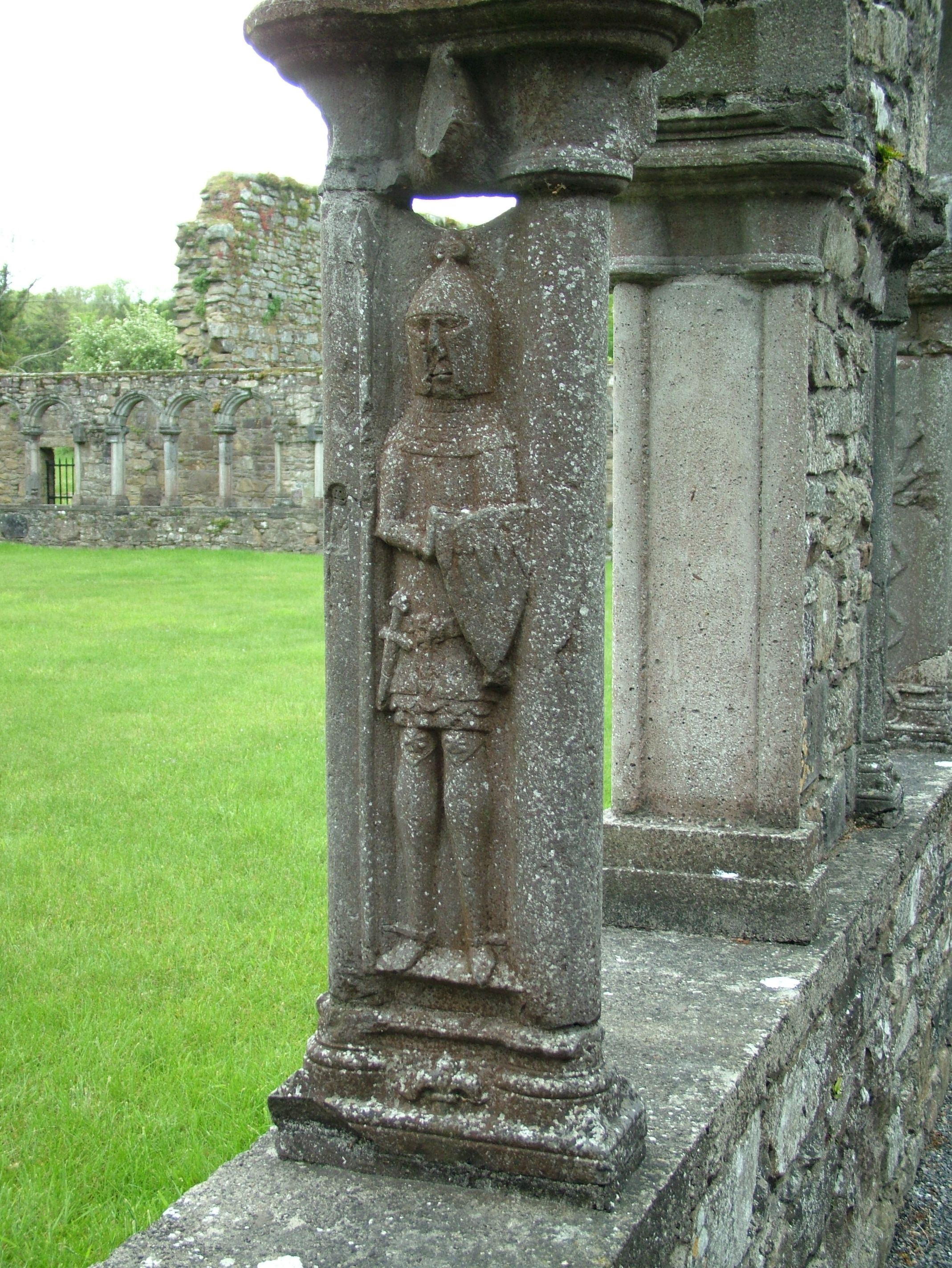 Jerpoint Abbey, Irland (Eire), eine Figur im Kreuzgang